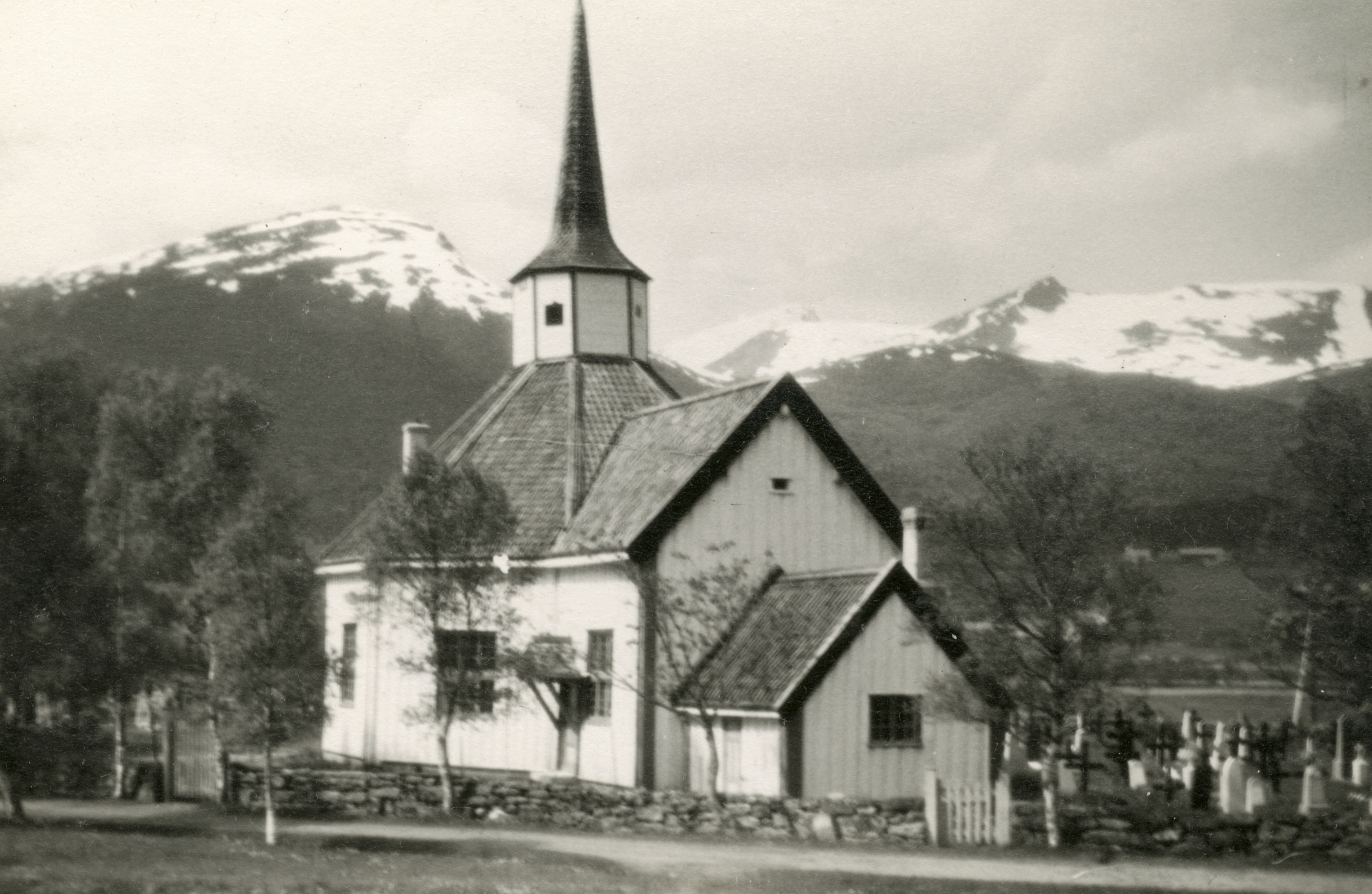 Tresfjord kirke i Tresfjord, Møre og Romsdal